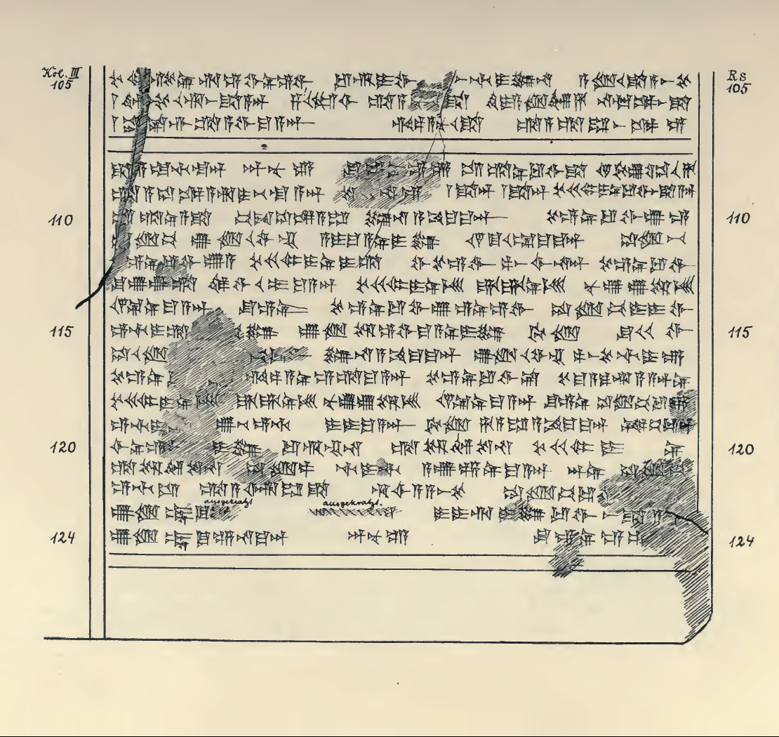 List Tuszratty do Amenhotepa III w języku huryckim – autografia.